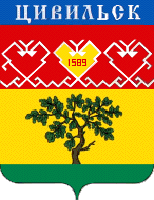 Герб Цивильска, принятый в 1989 году